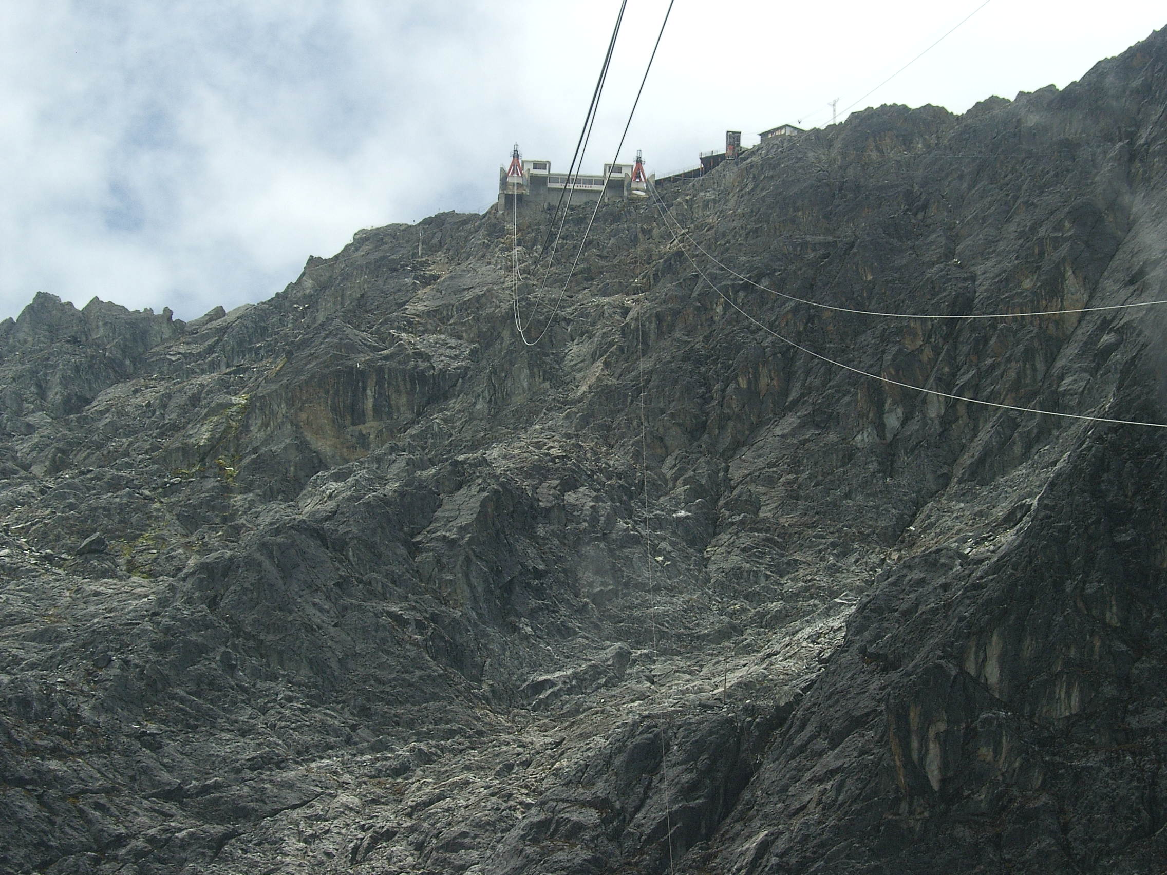 Llegada en teleférico al Pico Espejo desde la cámara de un amigo